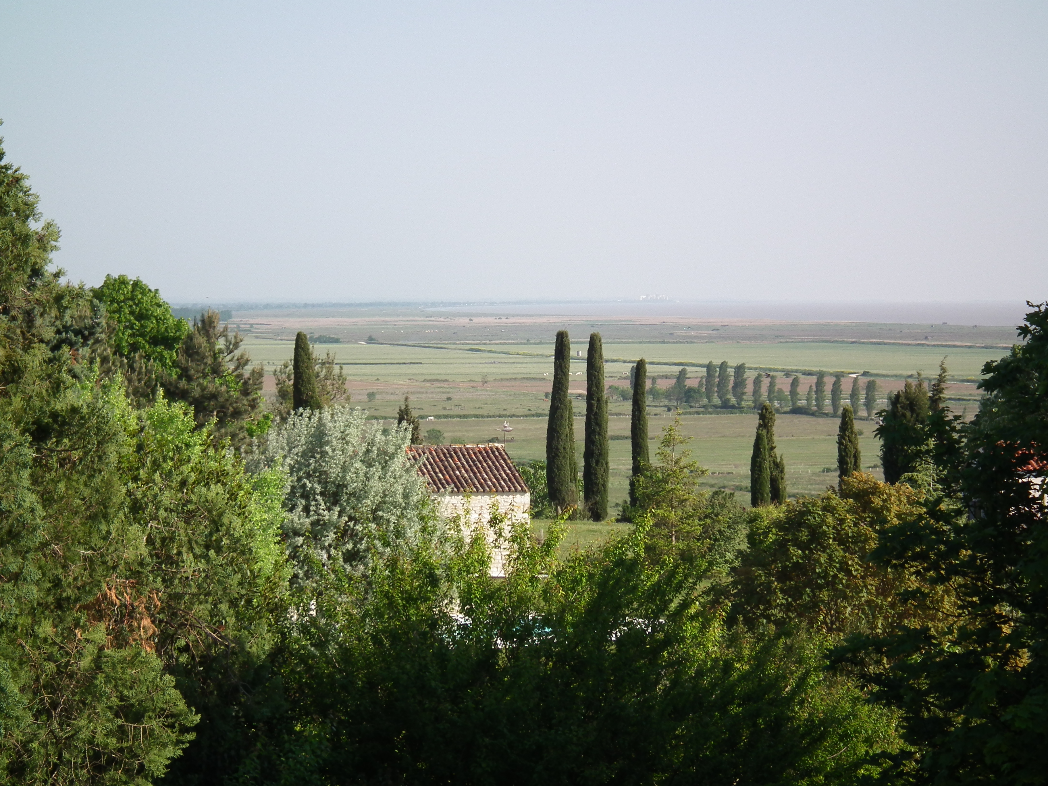 Paysage estuarien (marais et terres-basses) depuis Mortagne-sur-Gironde. Au dernier plan, la centrale nucléaire du Blayais.